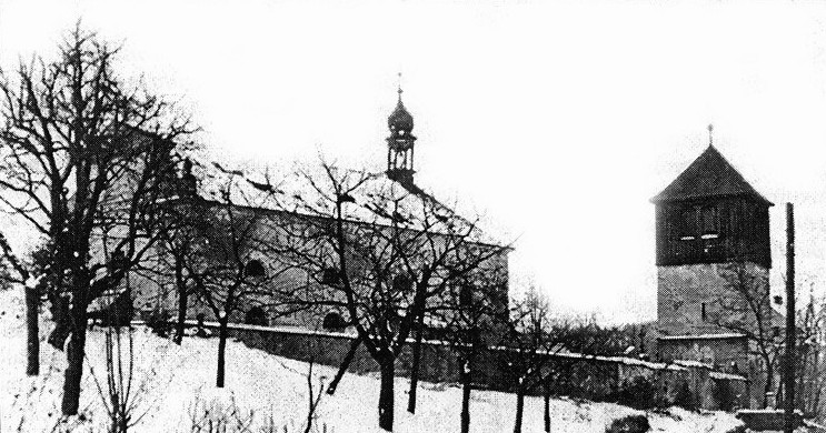 Dobový snímek kostela svaté Kateřiny Alexandrijské se zvonicí v Merbolticích